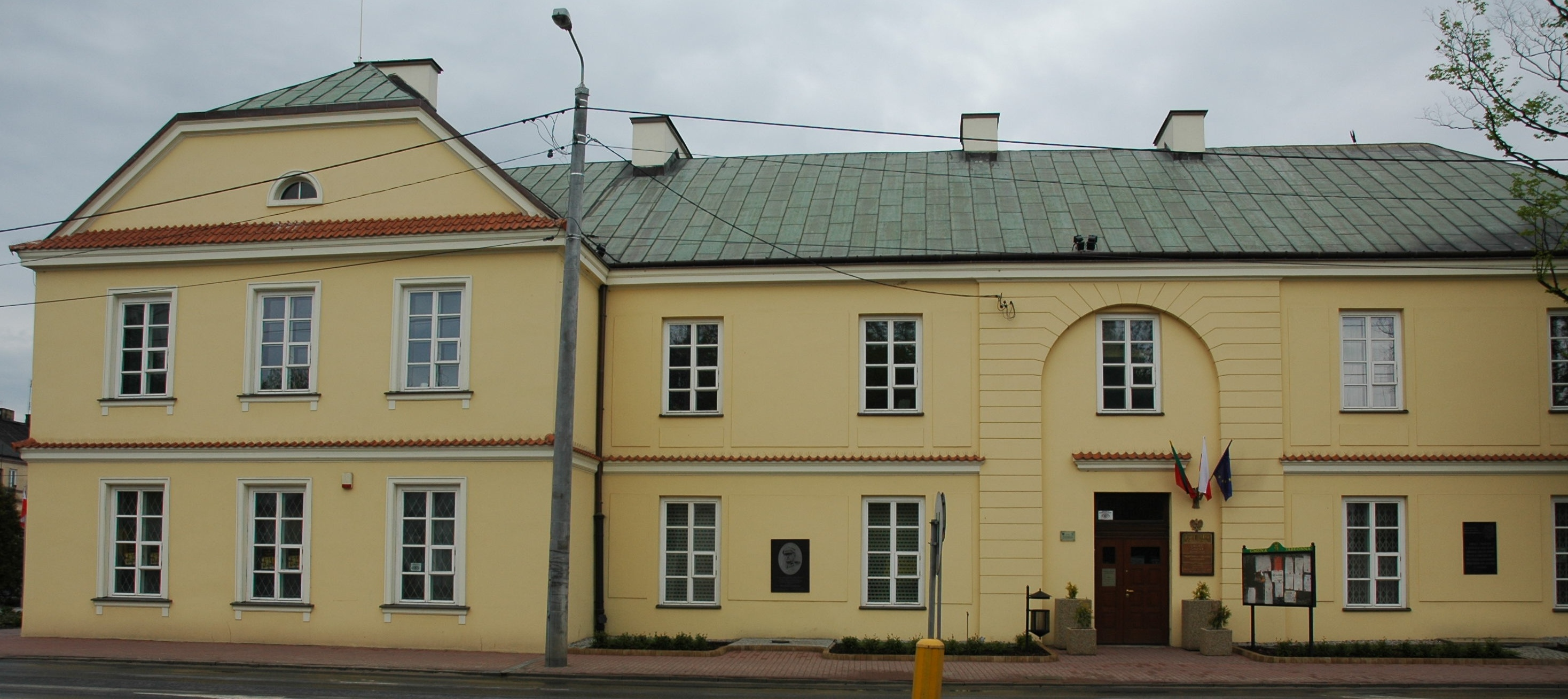 Jabłonna - Urząd Gminy